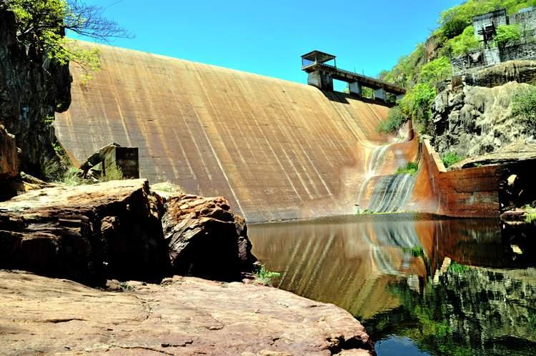 Pontos tursitico